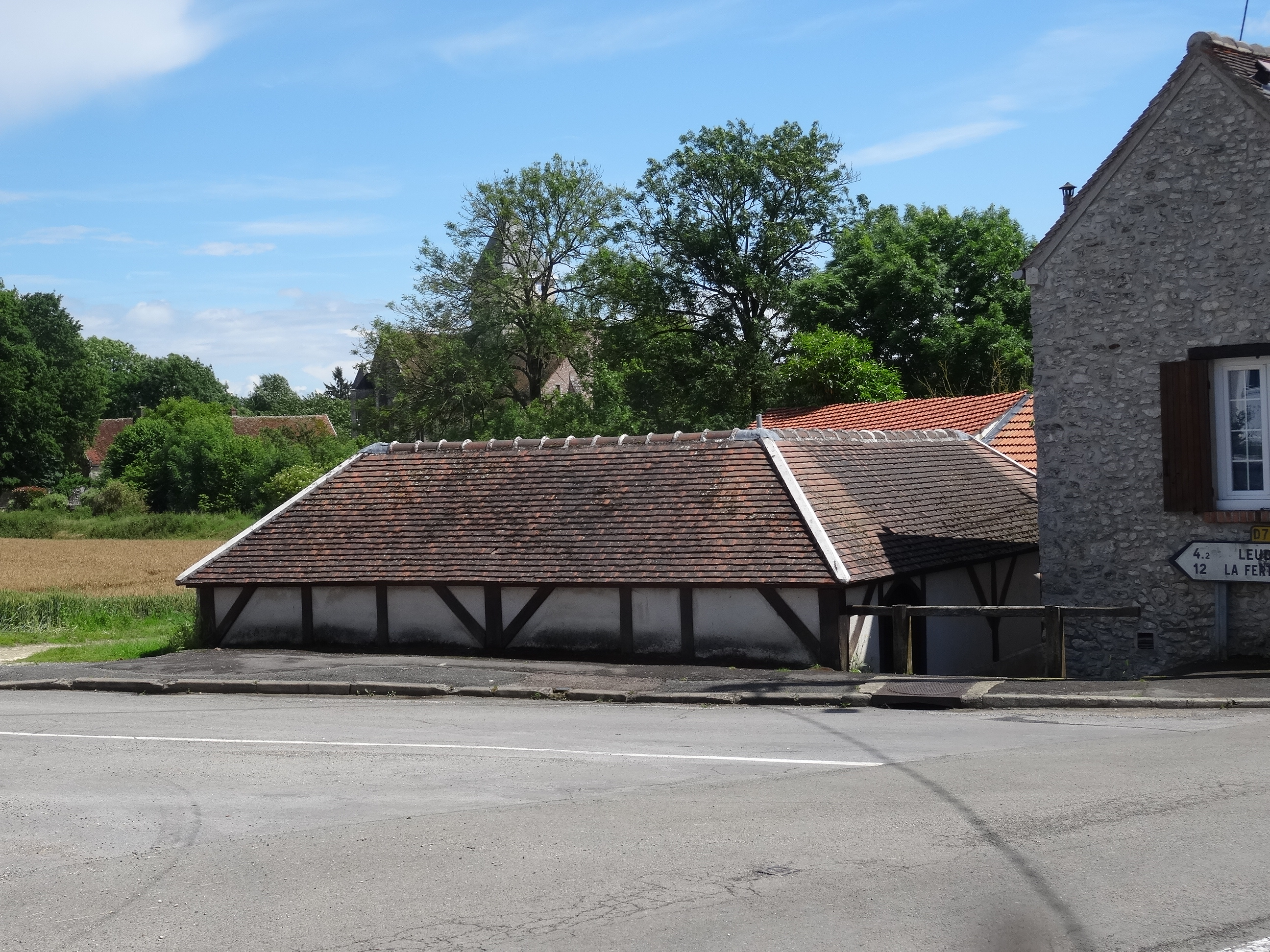 Lavoir de Beton-Bazoches. (Seine-et-Marne, région Île-de-France).